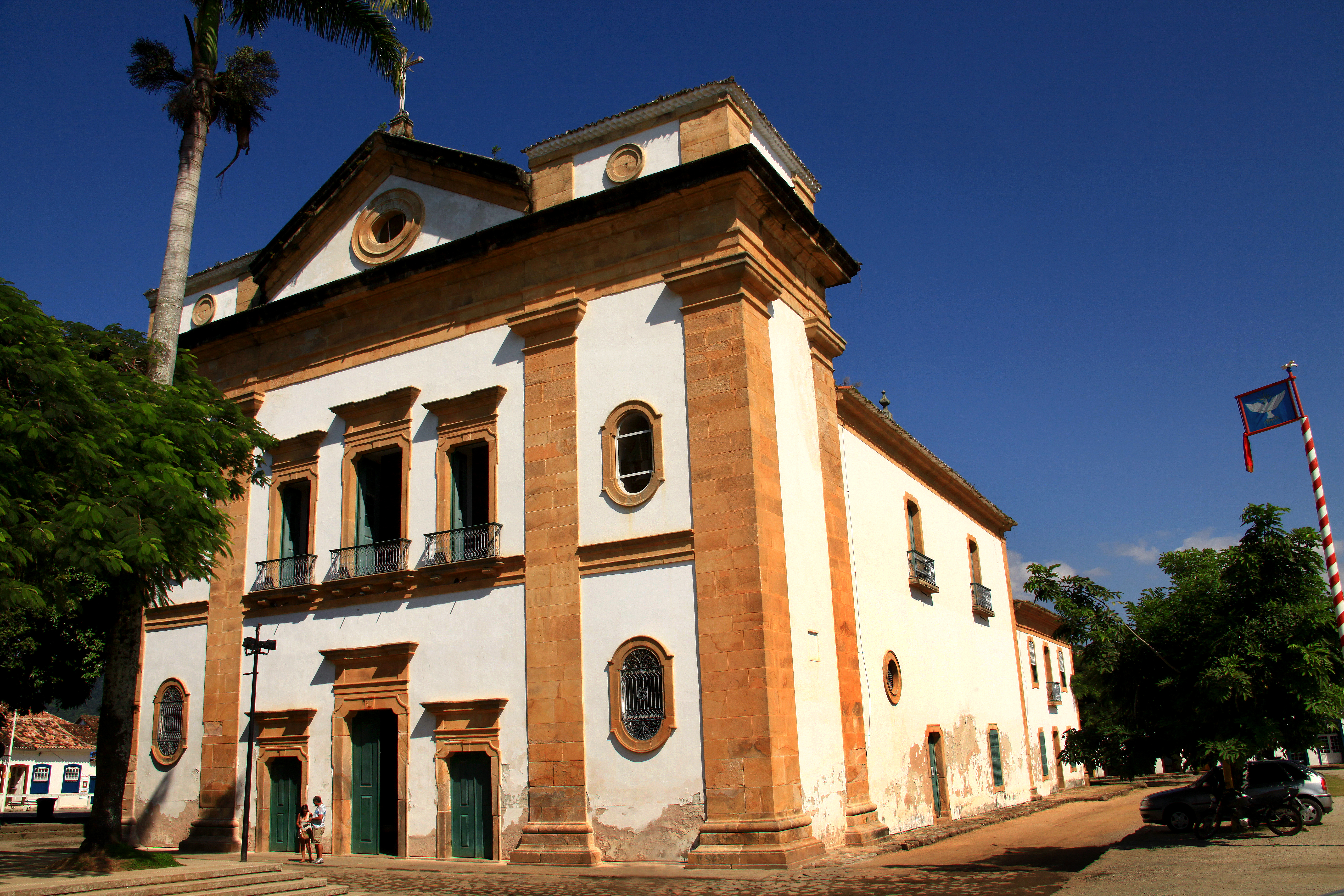 A histórica Paraty carrega uma forte influência religiosa, especificamente católica, vinda de Portugal. De estilo neoclássico, a Igreja da Matriz sobressai por sua imponência e apresenta a sobriedade e o despojamento característicos deste estilo, em que as grandes massas se contrapõem ao ritmo dos vãos. Contava a igreja com 7 altares e duas capelas internas. Atualmente, nas suas galerias superiores funciona a pinacoteca Antônio Marino Gouveia.